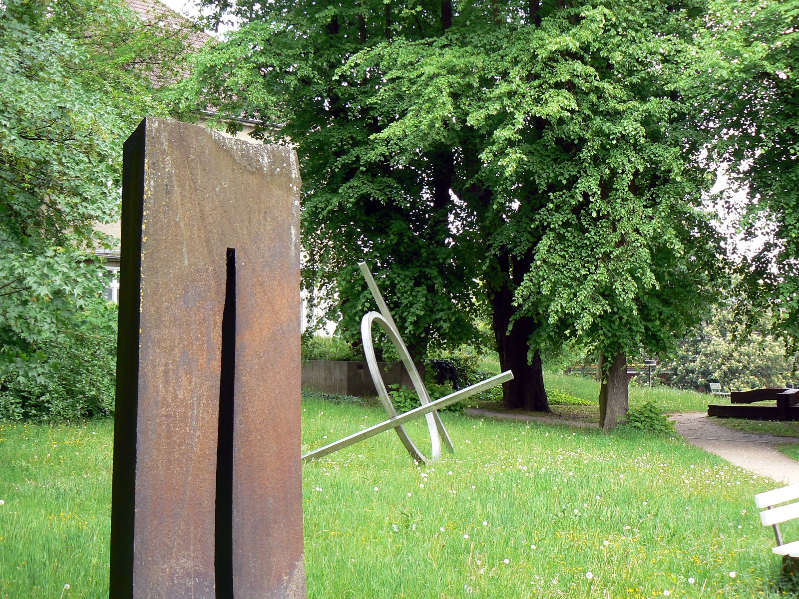 Skulpturengarten der Kunsthalle Kiel. Auf dem Bild: Skulpturen von Bard Breivik (vorne links), Alf Lechner (Mitte) und Per Kirkeby (hinten rechts).